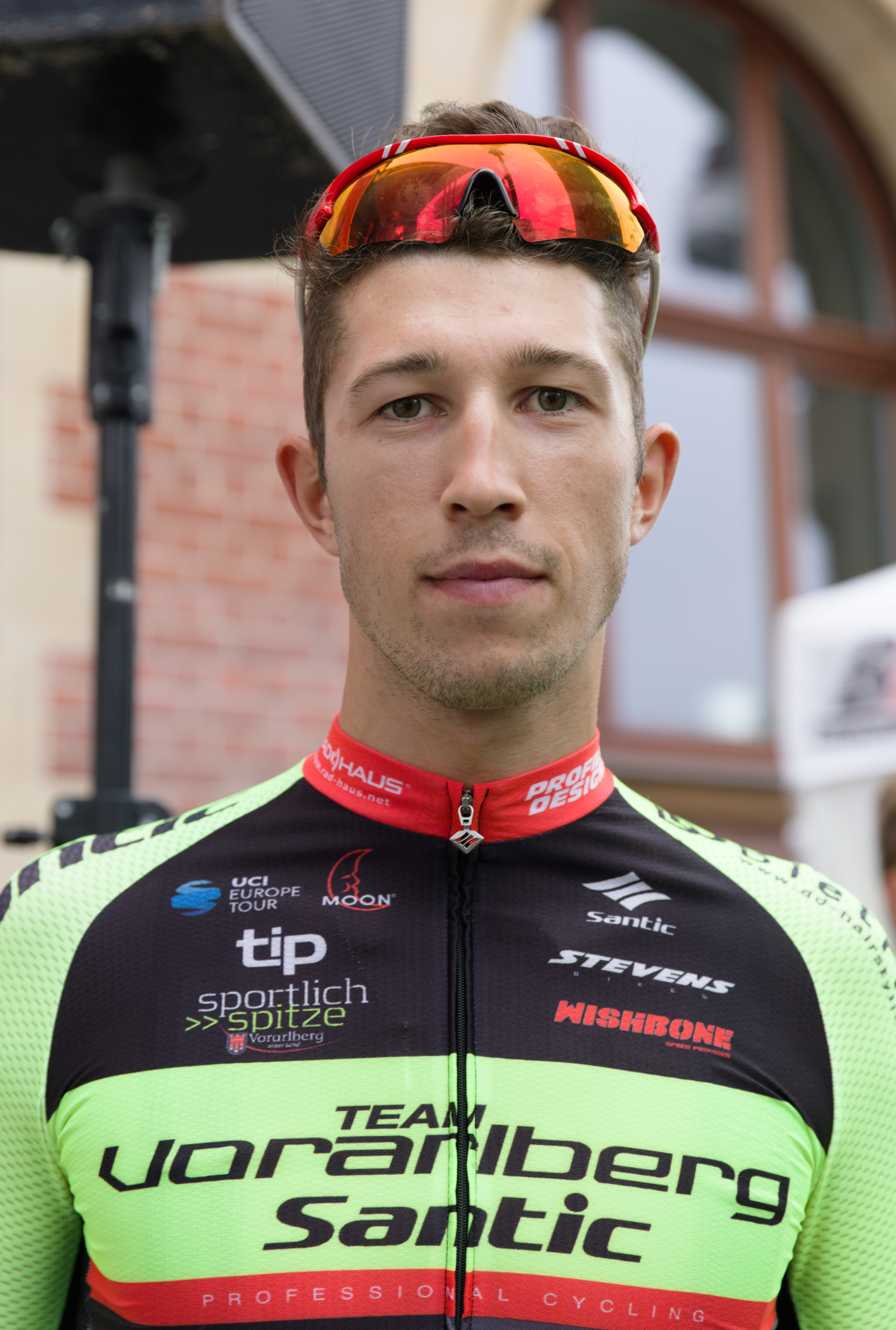 Jannik Steimle, deutscher Radsportler